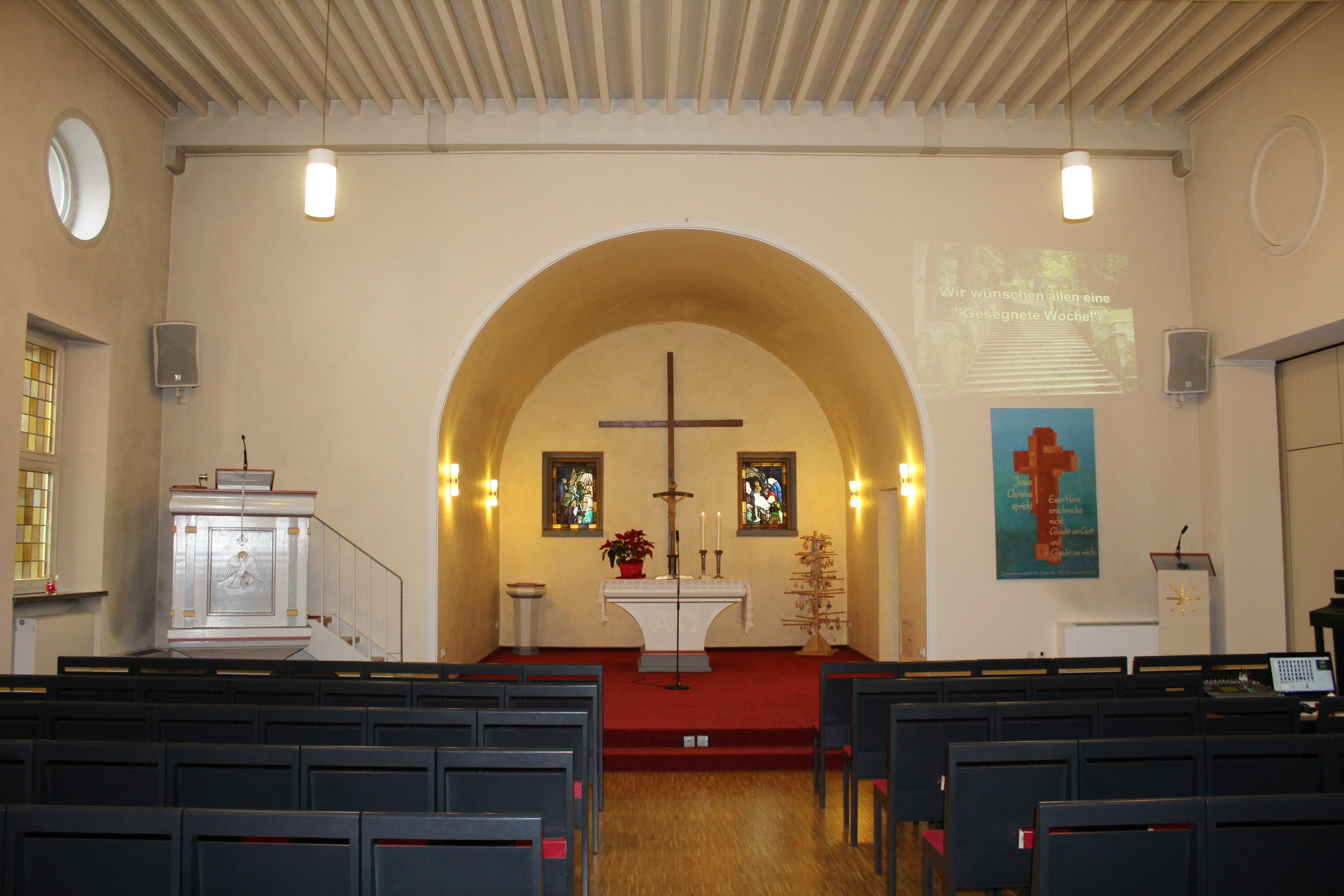 Evangelische Kirche Münchholzhausen, Wetzlar, Lahn-Dill-Kreis, Hessen, Deutschland